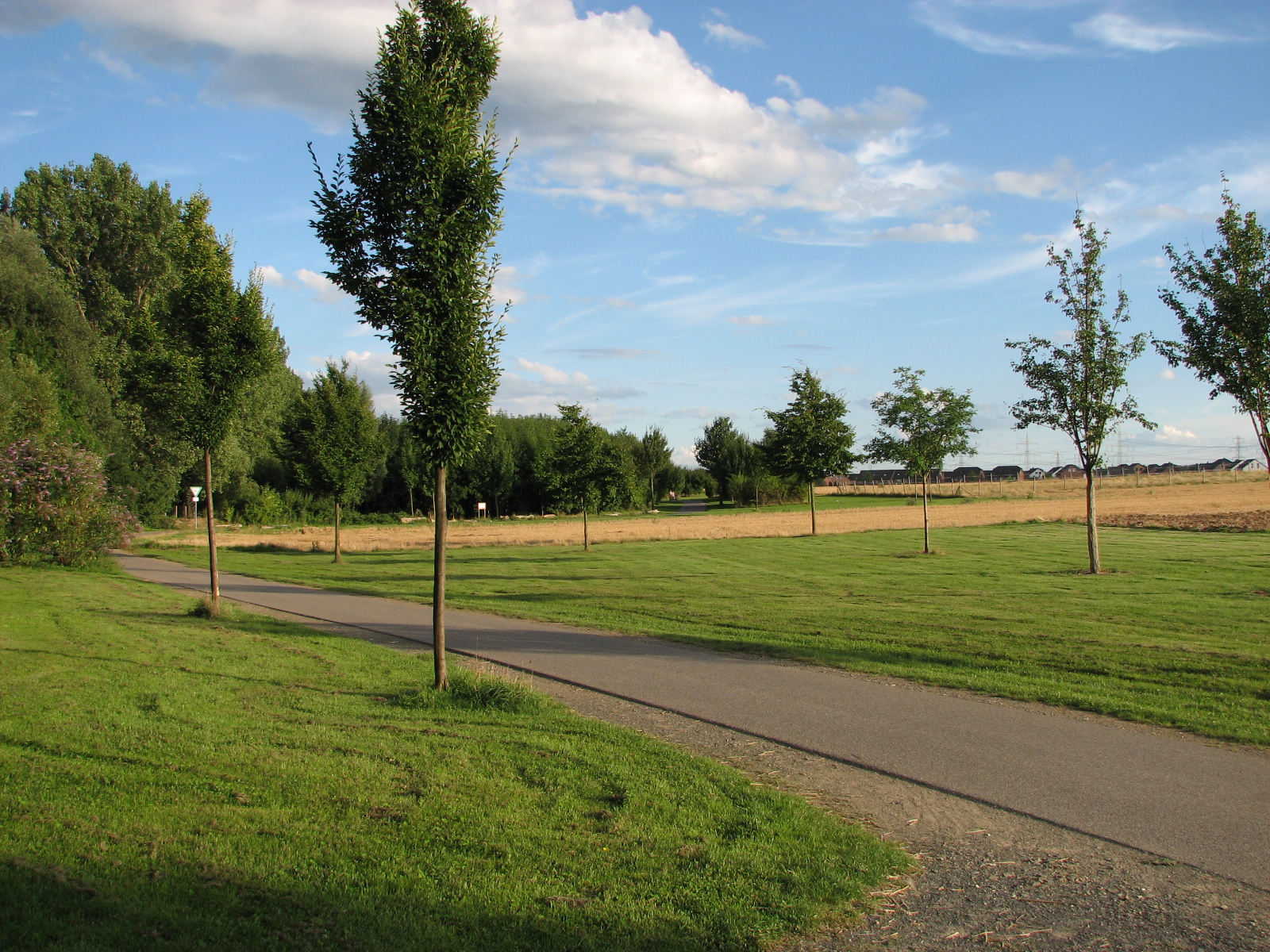 Impression